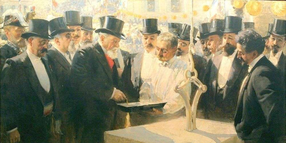 Armand Fallières pose la première pierre du théatre Ducourneau, Agen, 1906